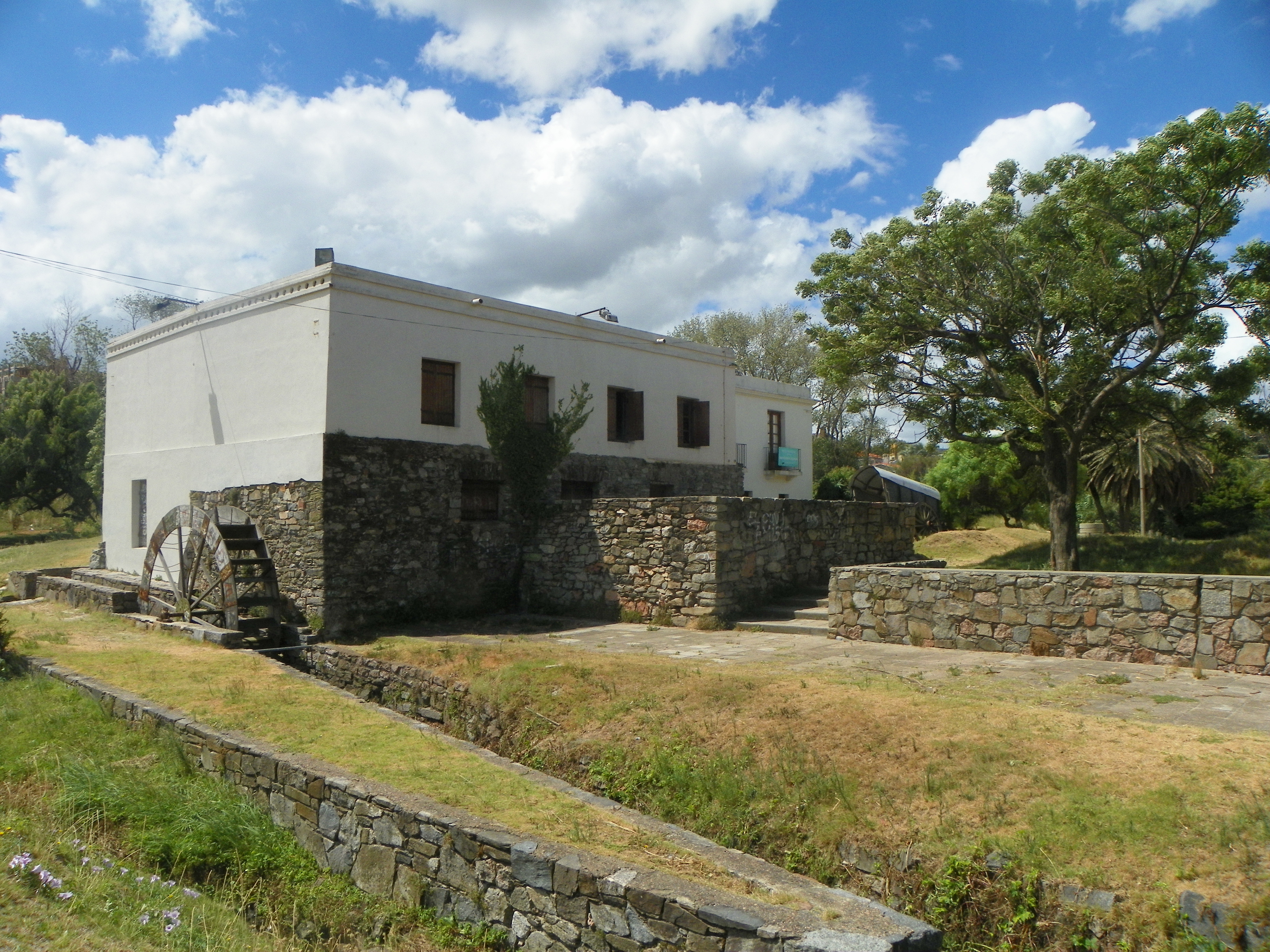 Antiguo Molino de Juan María Pérez - molino hidraúlico -. Ubicada en el departamento de Montevideo